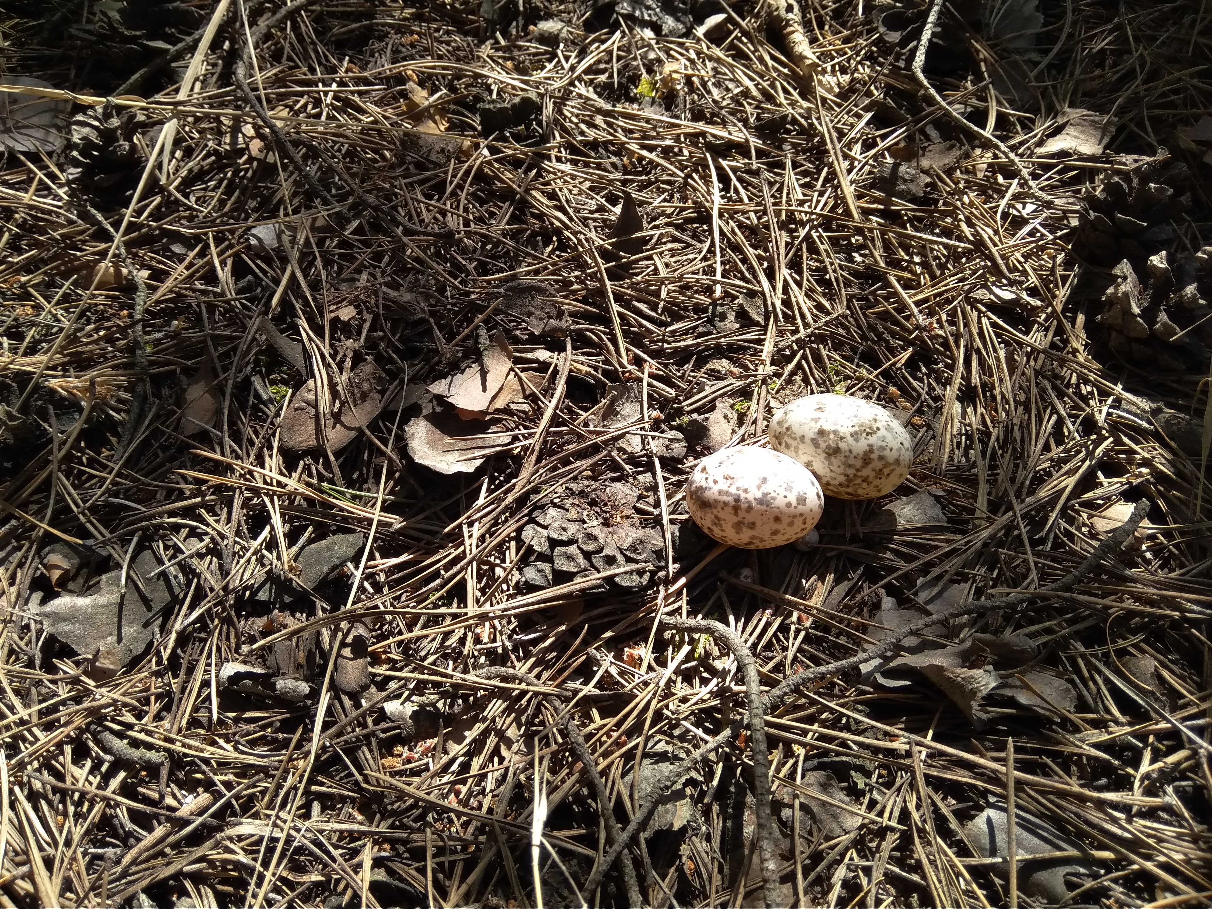 Знято смартфоном Миколаїв, сосновий ліс